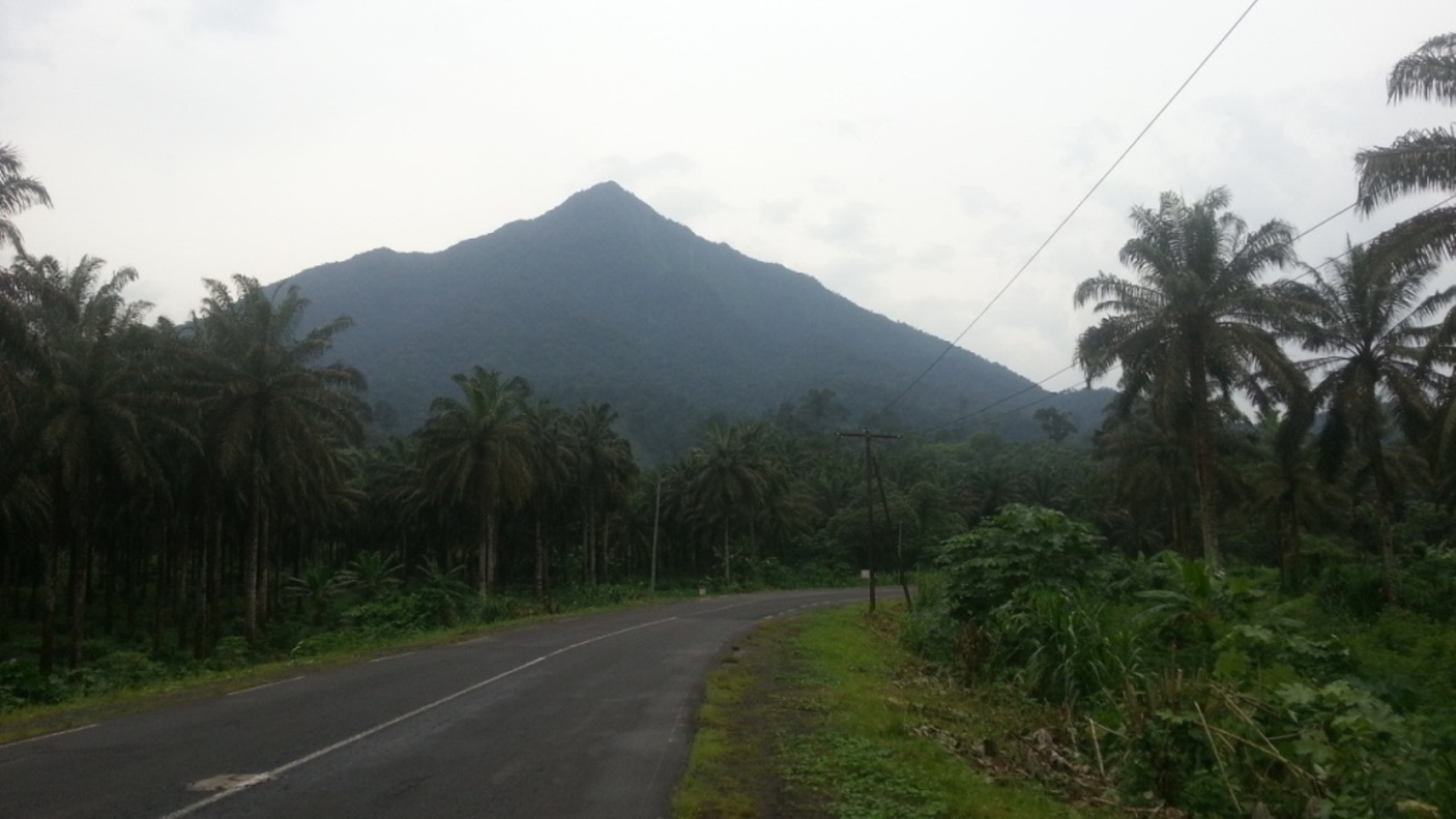 A distant view of Mt Etinde(1712m), located at the foot of Mt Cameroon and its also part of the Mount Cameroon national park in the South west region of Cameroon